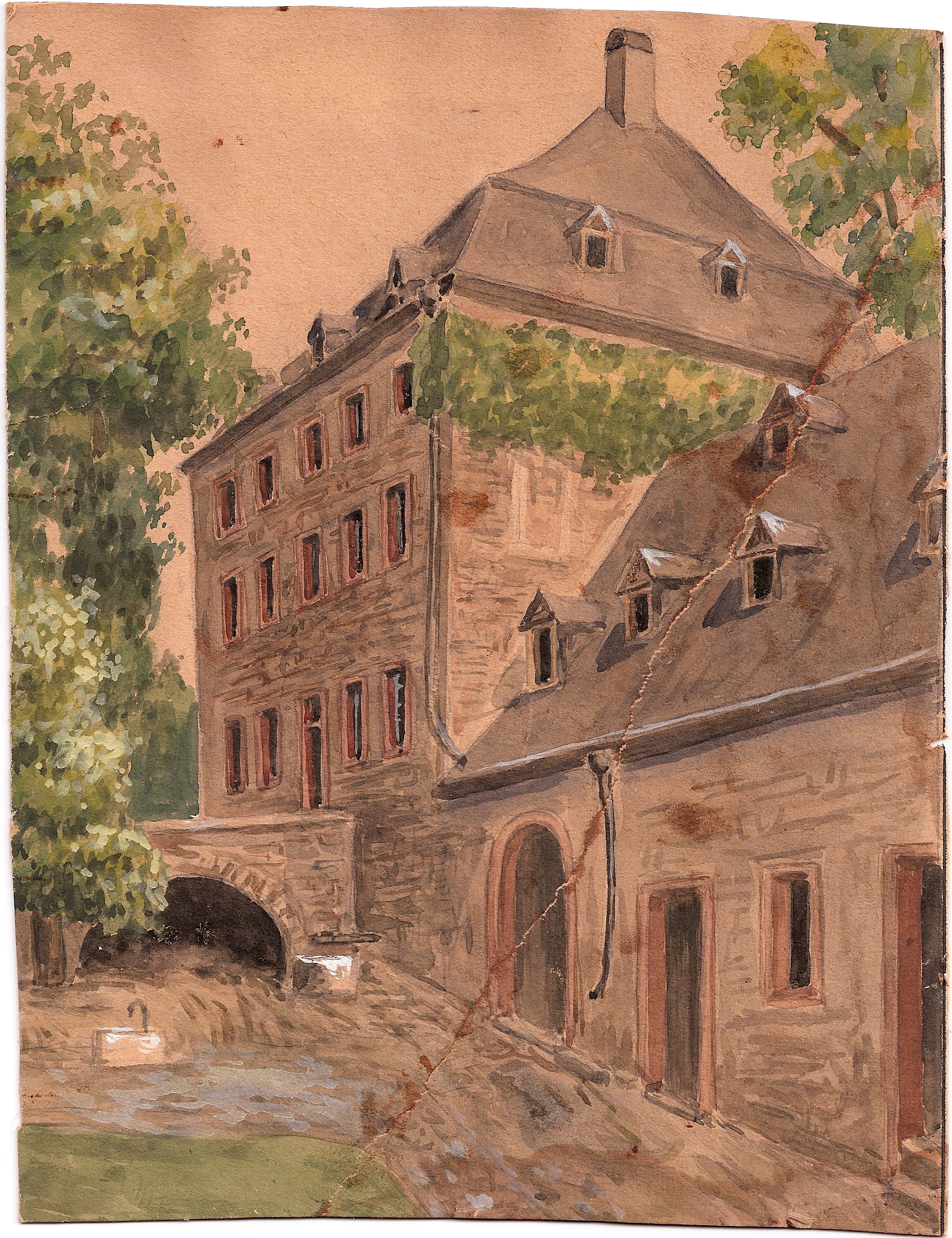 Château de Klüsserath près de Trèves(trier)en Allemagne.Cette peinture originale entre 1800-1900. Construction du wasserburg après 1200